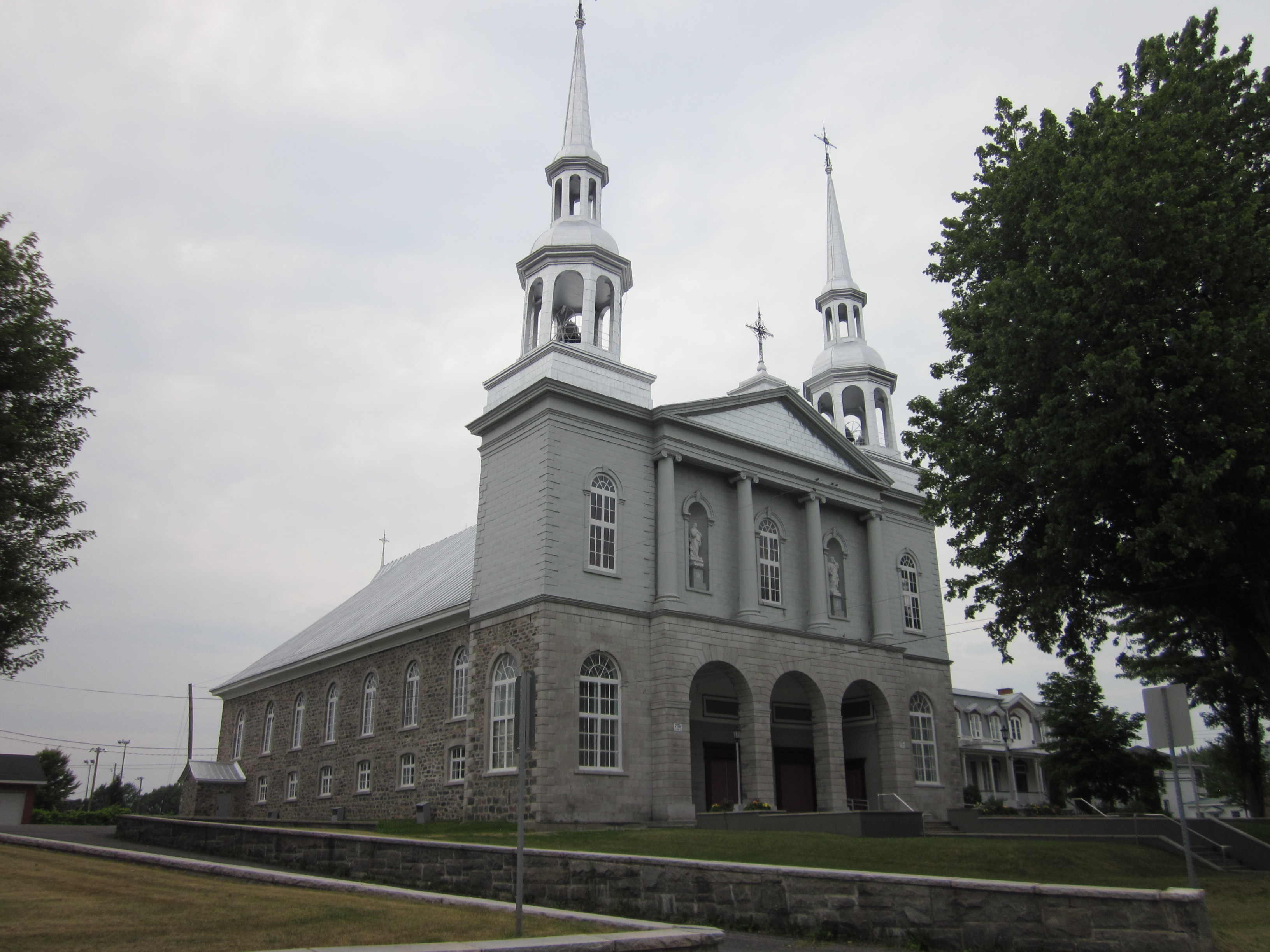 L'église Saint-Grégoire-le-Grand à Saint-Grégoire est une église qui a été construite en 1806. Elle a été classée monument historique en 1957.